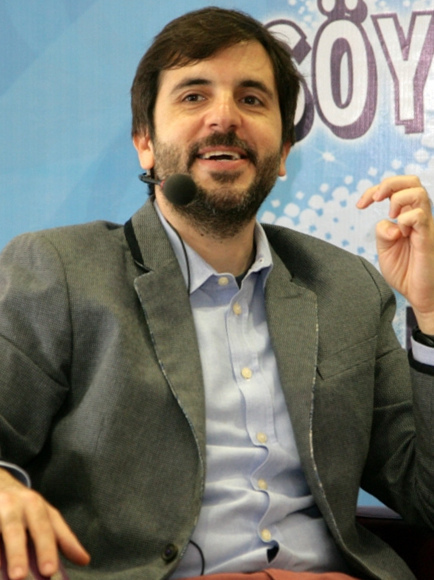 Osman Tan Erkır